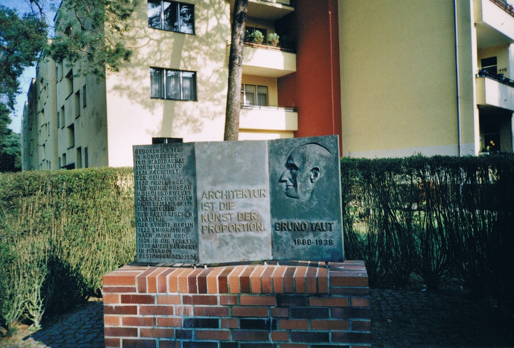 Bruno Taut Denkmal in der Siedlung Onkel Toms Hütte. Foto: Laura de Lang